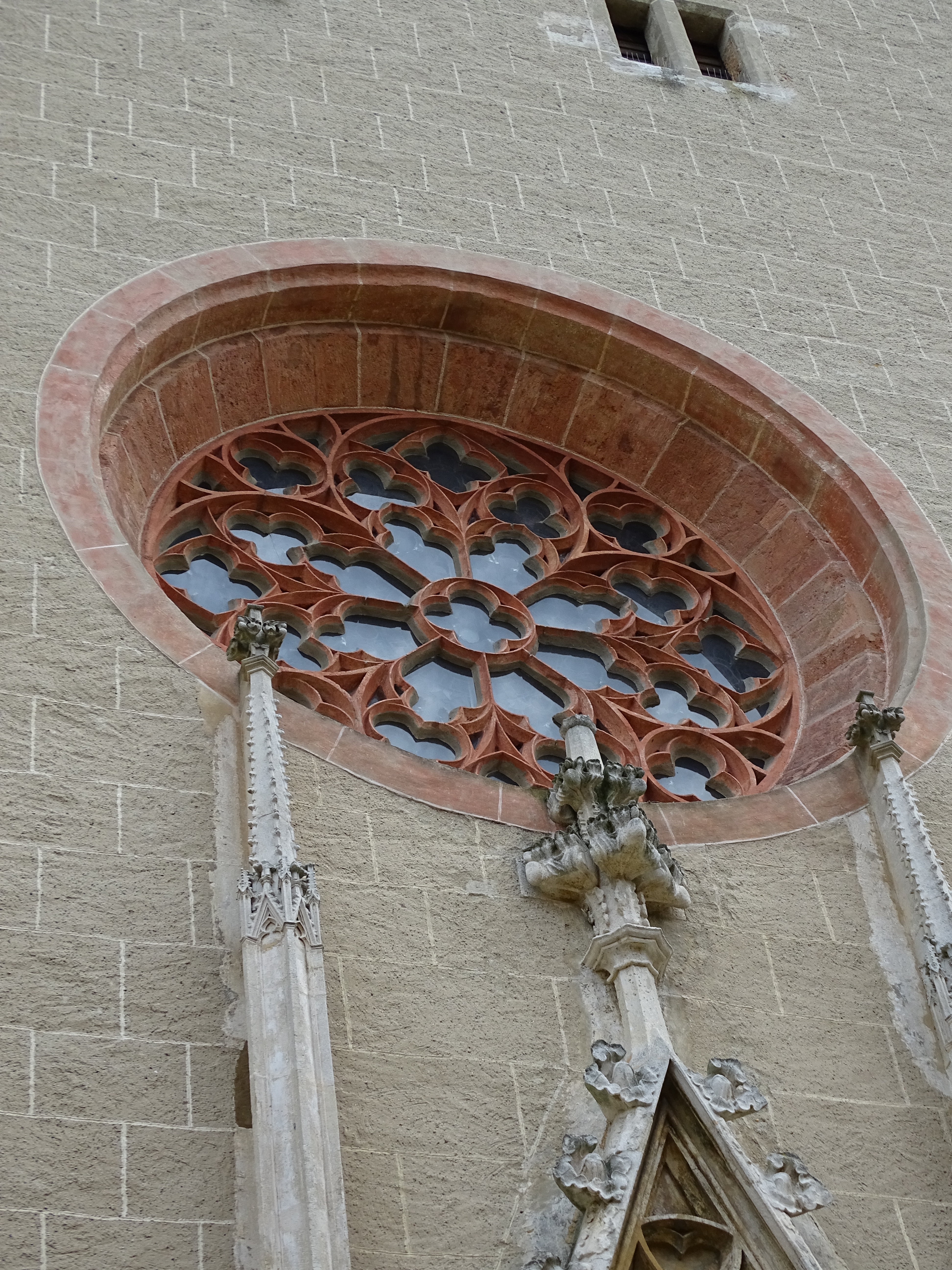 Das Rosettenfenster über dem Westportal der Wallfahrtskirche Maria Straßengel von aussen